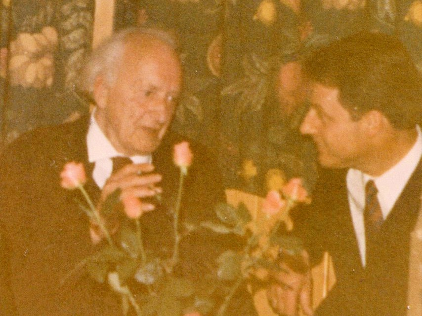 Rechtsanwalt Erwin Cuntz (links) bei der Feier seines 90. Geburtstages 1968 (rechts Hans Josef Cüppers).